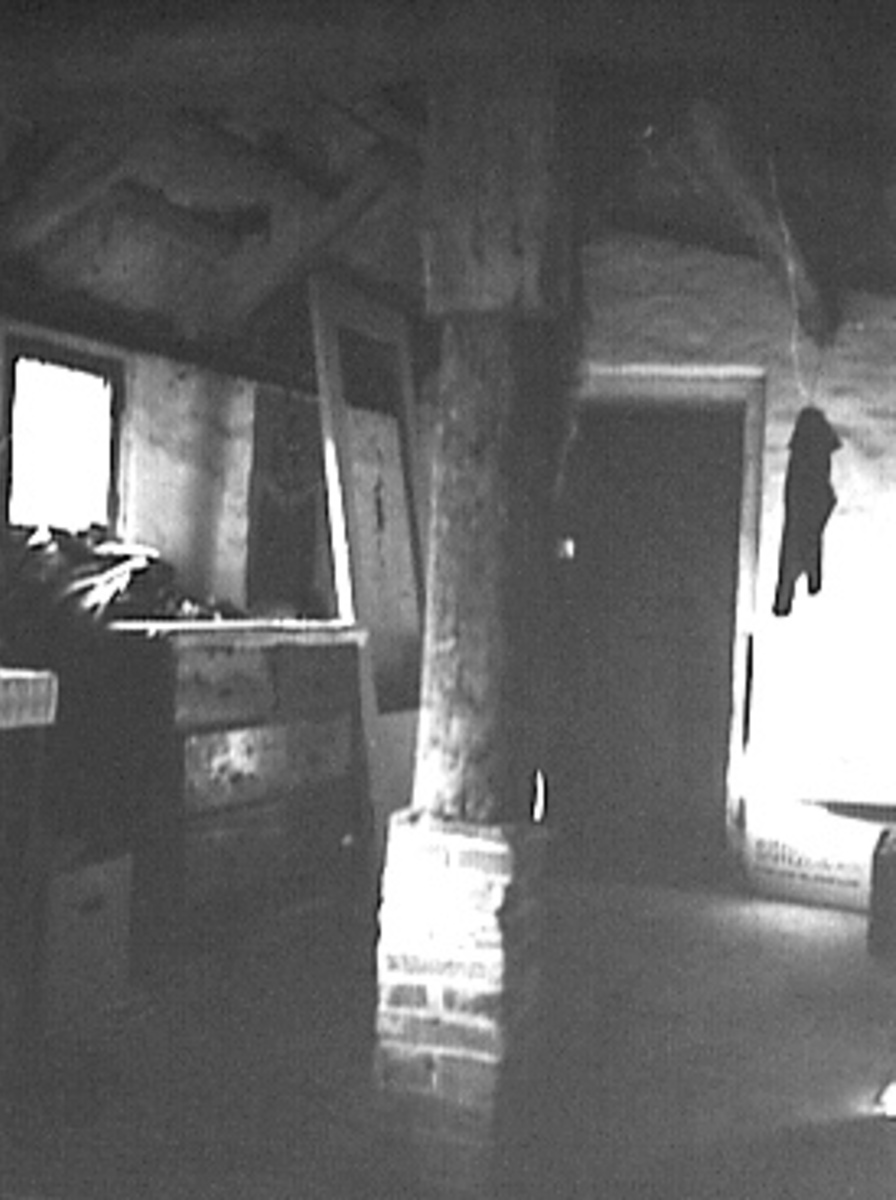 Alblasserwaard-vijfheerenlanden/ Houtconstructie: stijl en poer in bakhuis/zomerhuis (opmerking: Deze afbeelding hebben wij helaas alleen in deze lage resolutie.)